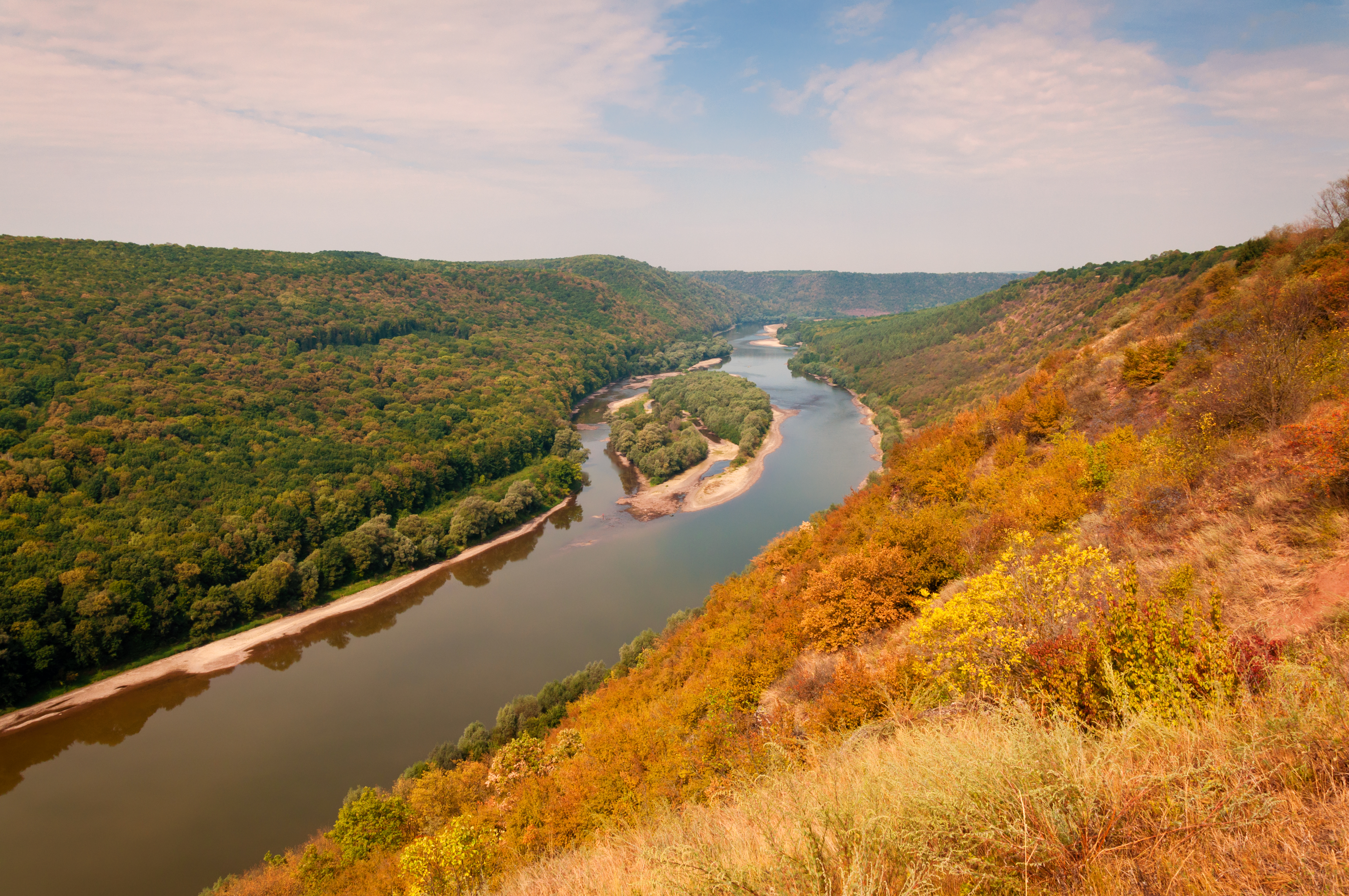 «Дністровський каньйон» поблизу с. Литяч Заліщицького району Тернопільської области.